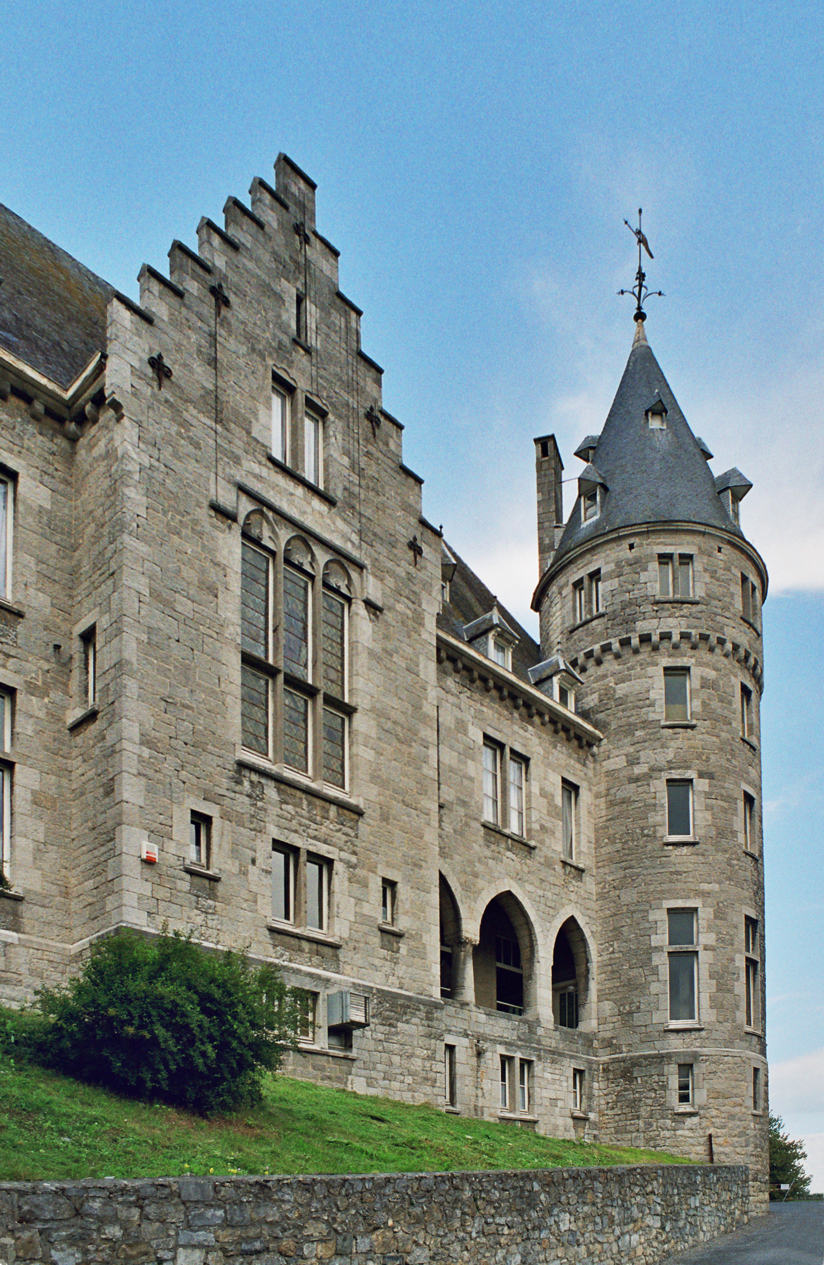 Das sogenannte Château neuf oder Château Cousin in Rochefort, Belgien